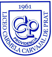 Liceo Carmela Carvajal de Prat